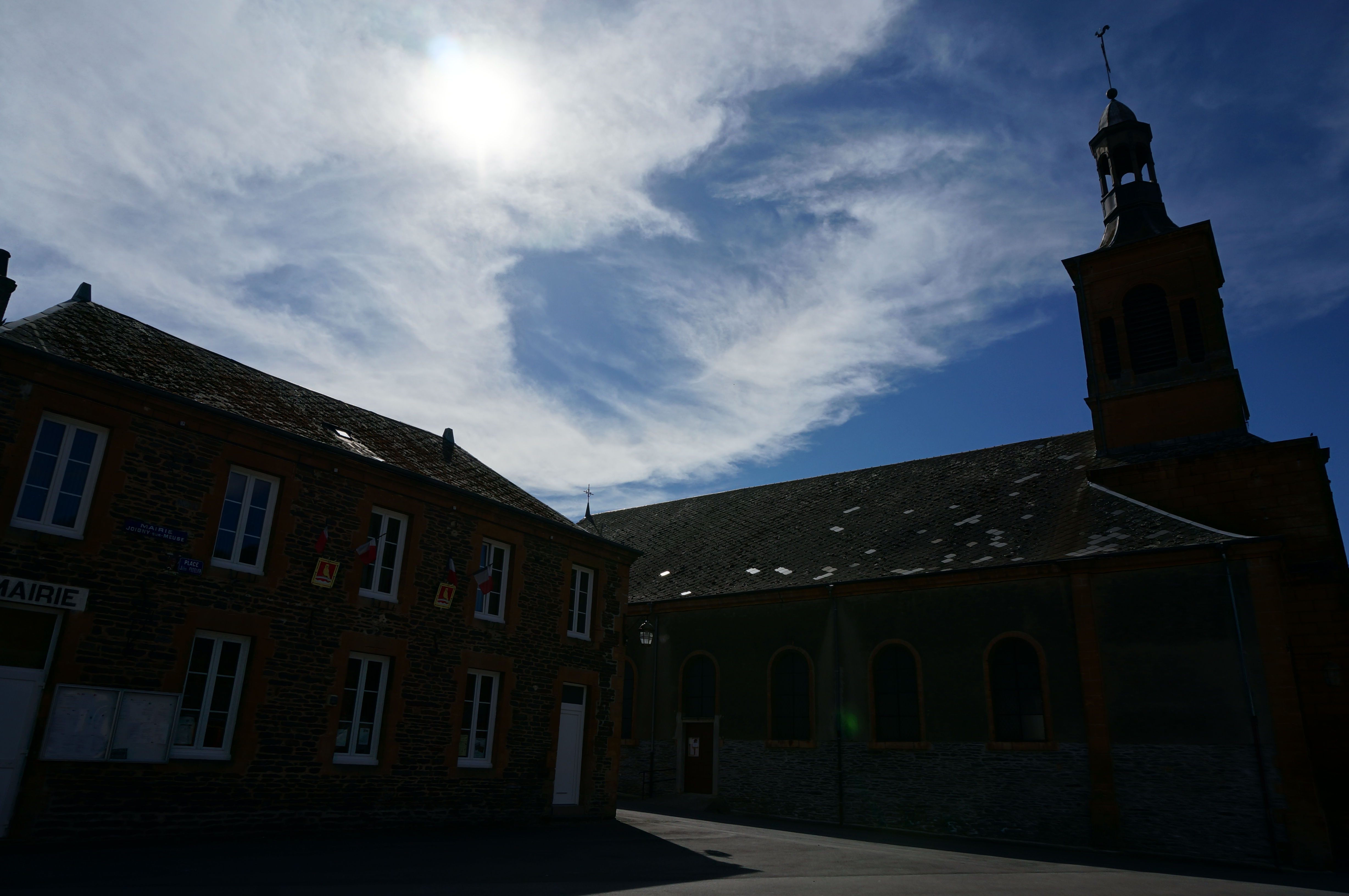 vue de l'église de Joigny sur Meuse.